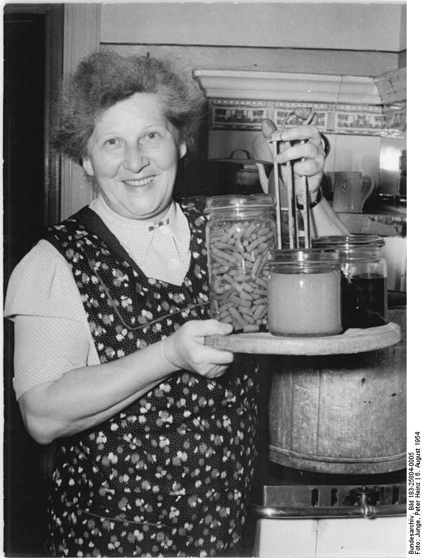 Einkochen Zentralbild Junge Bae-Ku. 5 Motive 6.8.1954 Eine wahre Vertreterin des Volkes. UBz: Frau Harloff bei der Hausarbeit. siehe Begleittext.